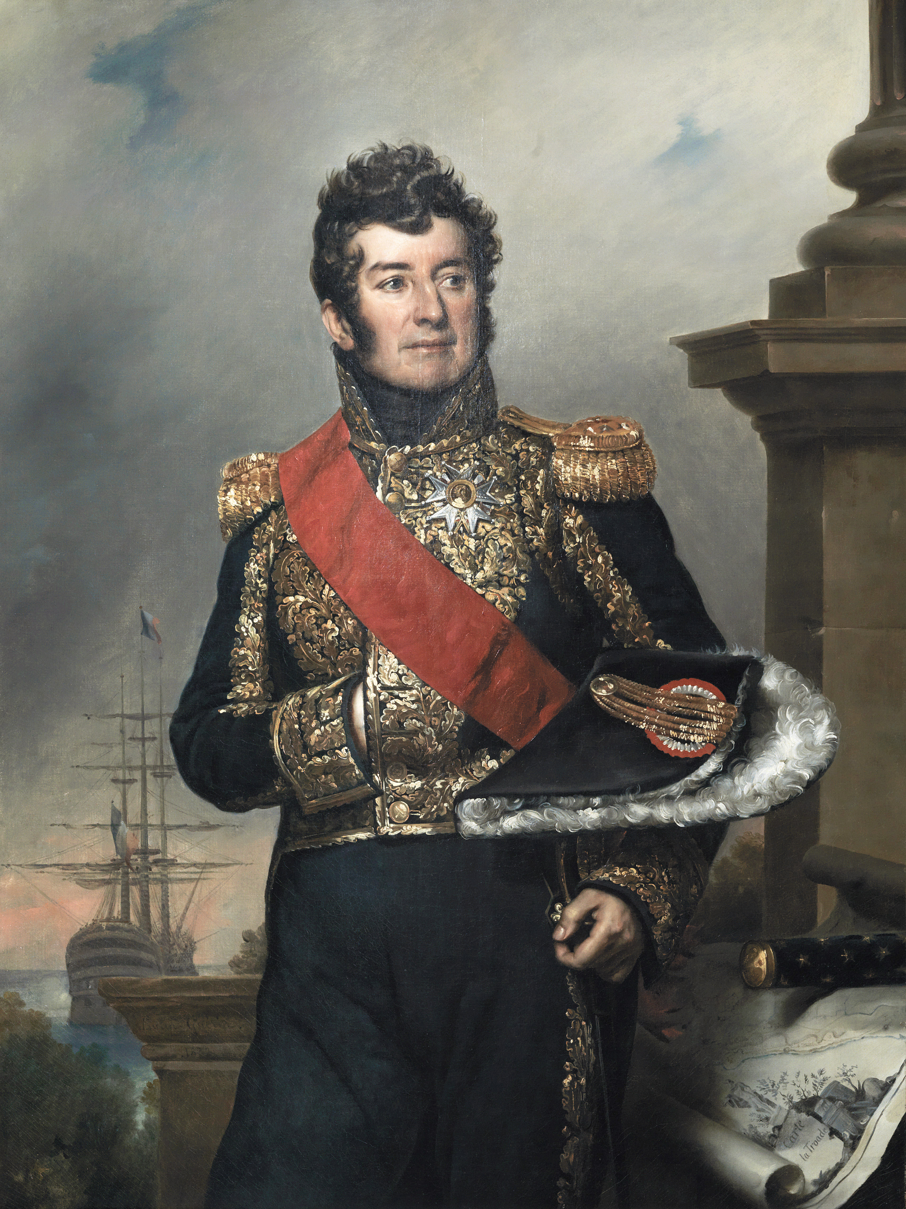 Portrait du comte Laurent-Jean-François Truguet, Amiral de France